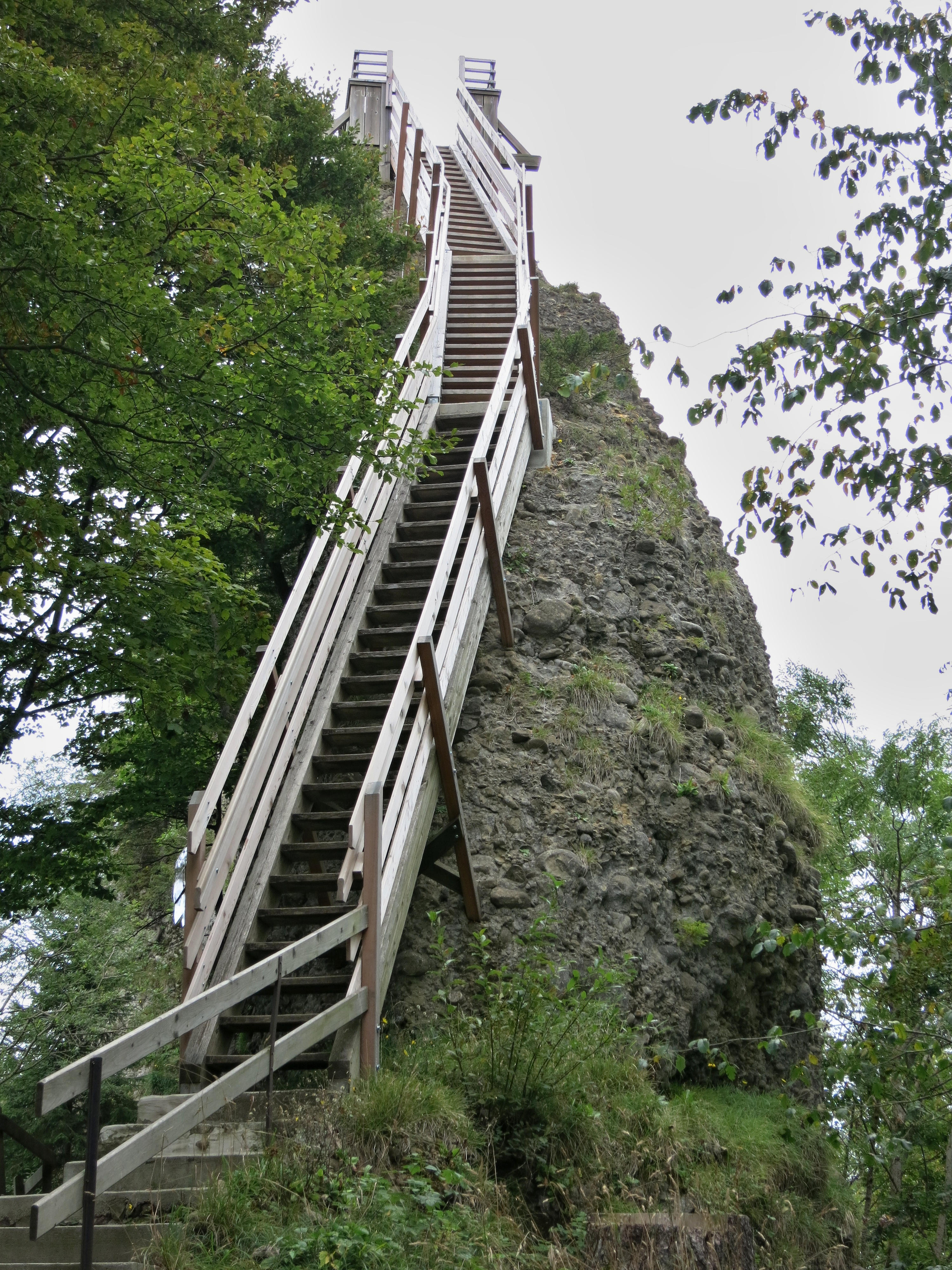 Guggershörnli